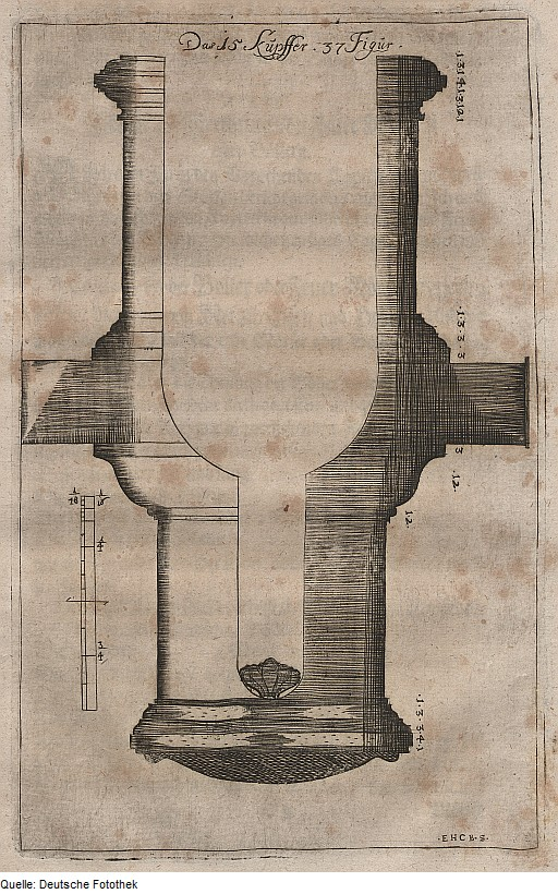 Original image description from the Deutsche Fotothek Kriegskunde & Artillerie & Geschütz